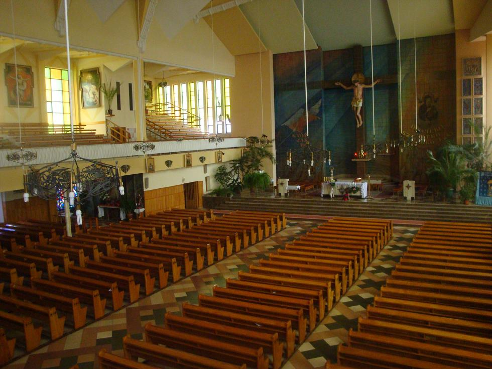 Kościół Matki Bożej Nieustającej Pomocy w Tarnobrzegu-Serbinowie